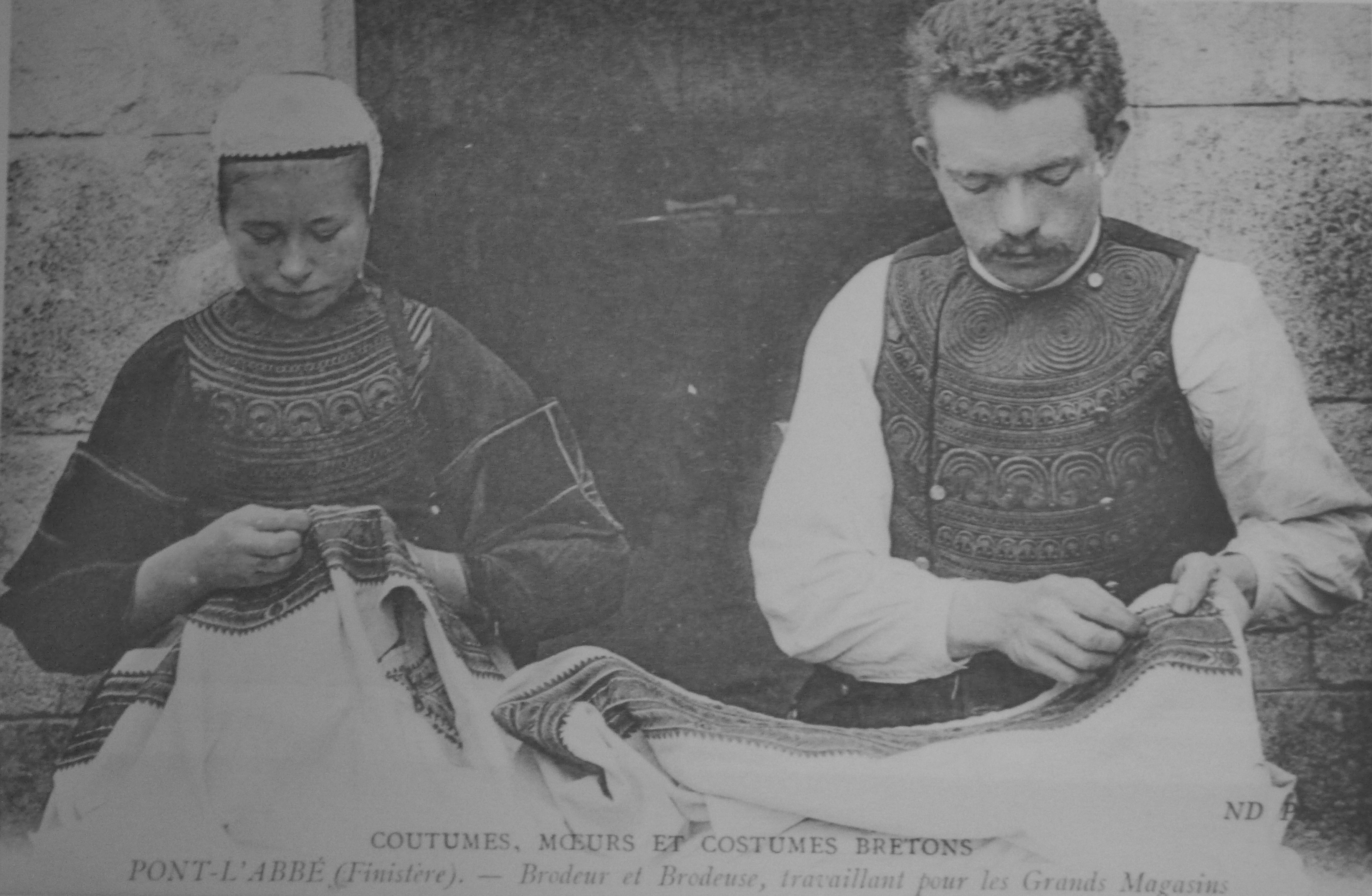 Brodeuse et brodeur bigouden au début du XXème siècle (Musée Bigouden, Pont-l'Abbé)